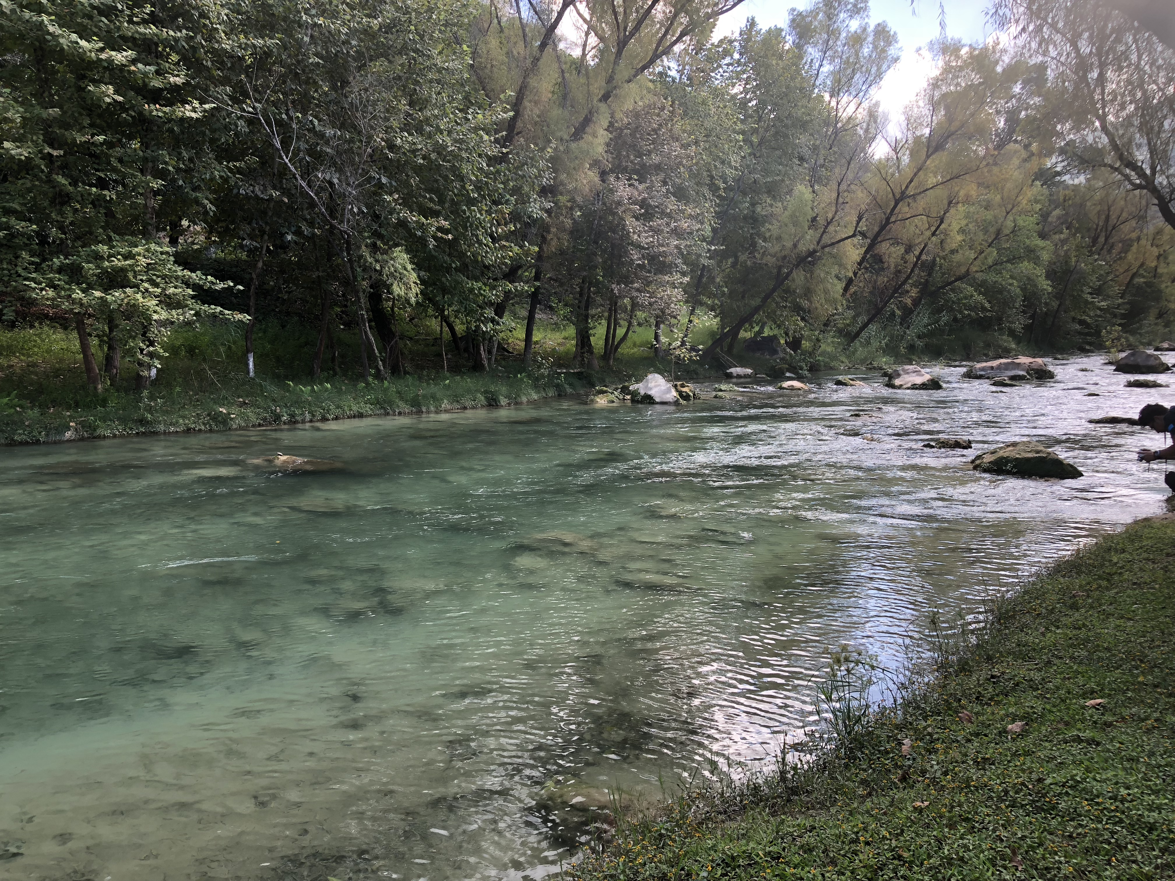 Foto del Arroyo seco, tomada de forma frontal